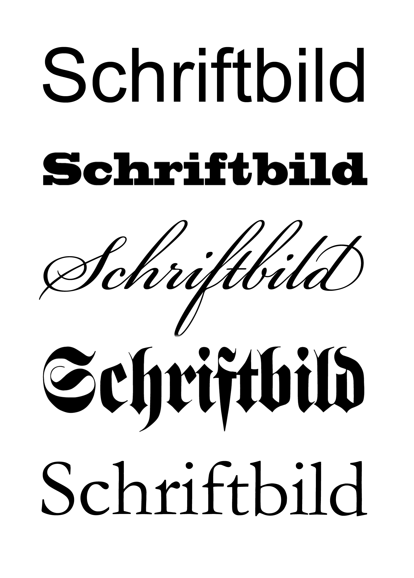 "Schriftbild" in verschiedenen Schriftarten